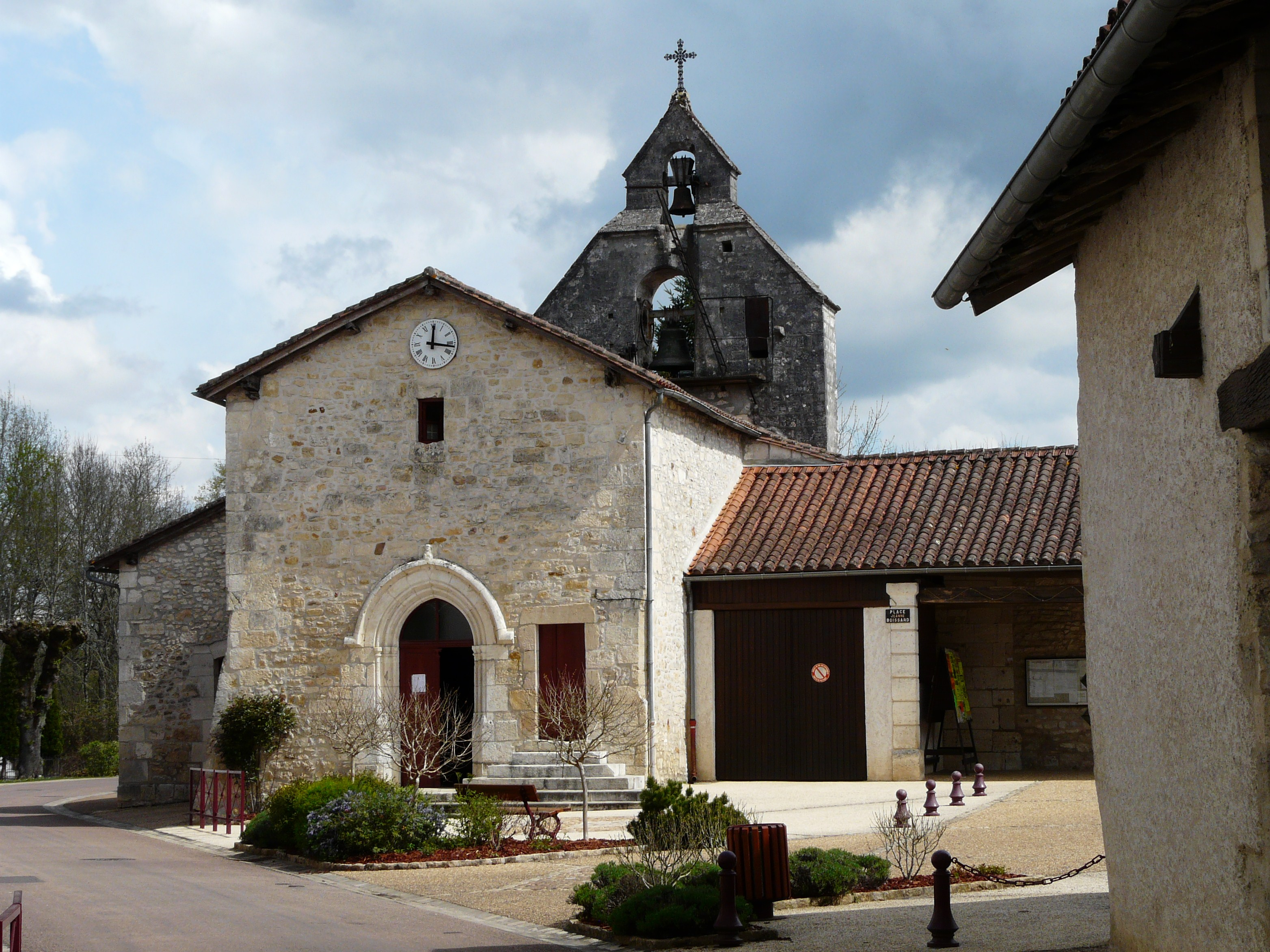 L'église Saint-Front, Saint-Front-la-Rivière, Dordogne, France